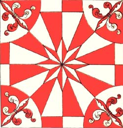 Bandiera della magistratura di San Francesco del Gioco del Ponte di Pisa